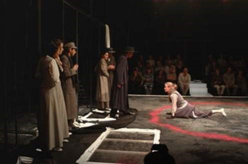 "הדיבוק" מאת אנסקי, בימוי ועיבוד דויד זינדר, עיצוב במה ותלבושות מרים גורצקי, התיאטרון המוניציפלי ההונגרי שבעיר קלוז, רומניה 2002